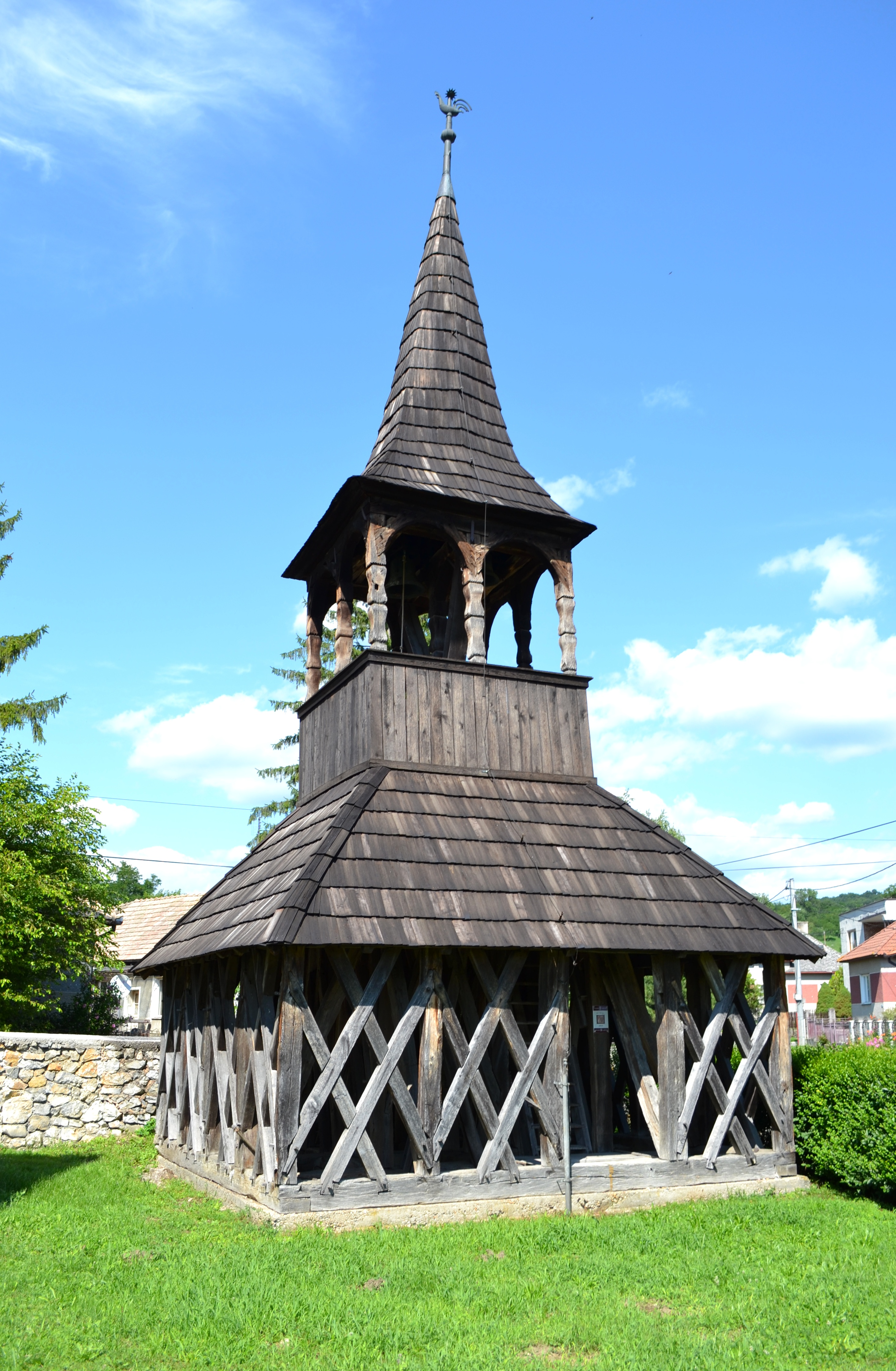 Drevená zvonica v obci Hubovo postavená v štýle ľudového staviteľstva v 90.rokoch 18.storočia postavená bez použitia jediného klinca